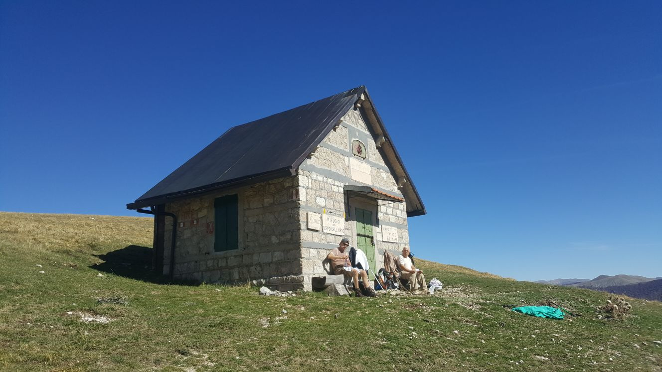 Preappennino abruzzese